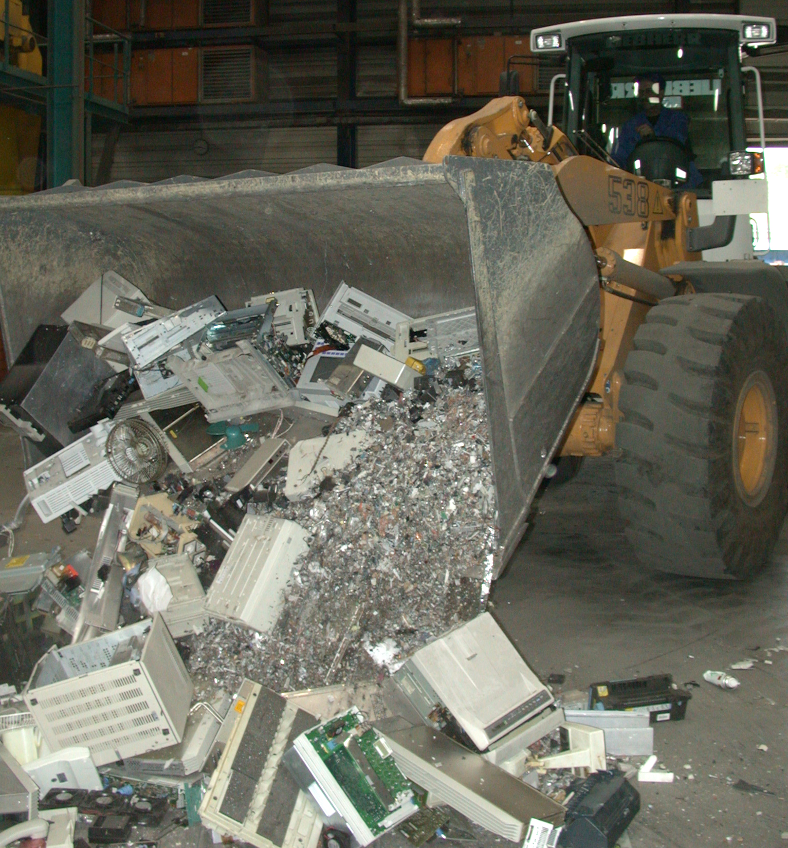 Verarbeitung von Elektroschrott in einer Recyclingfirma in Goslar, Deutschland